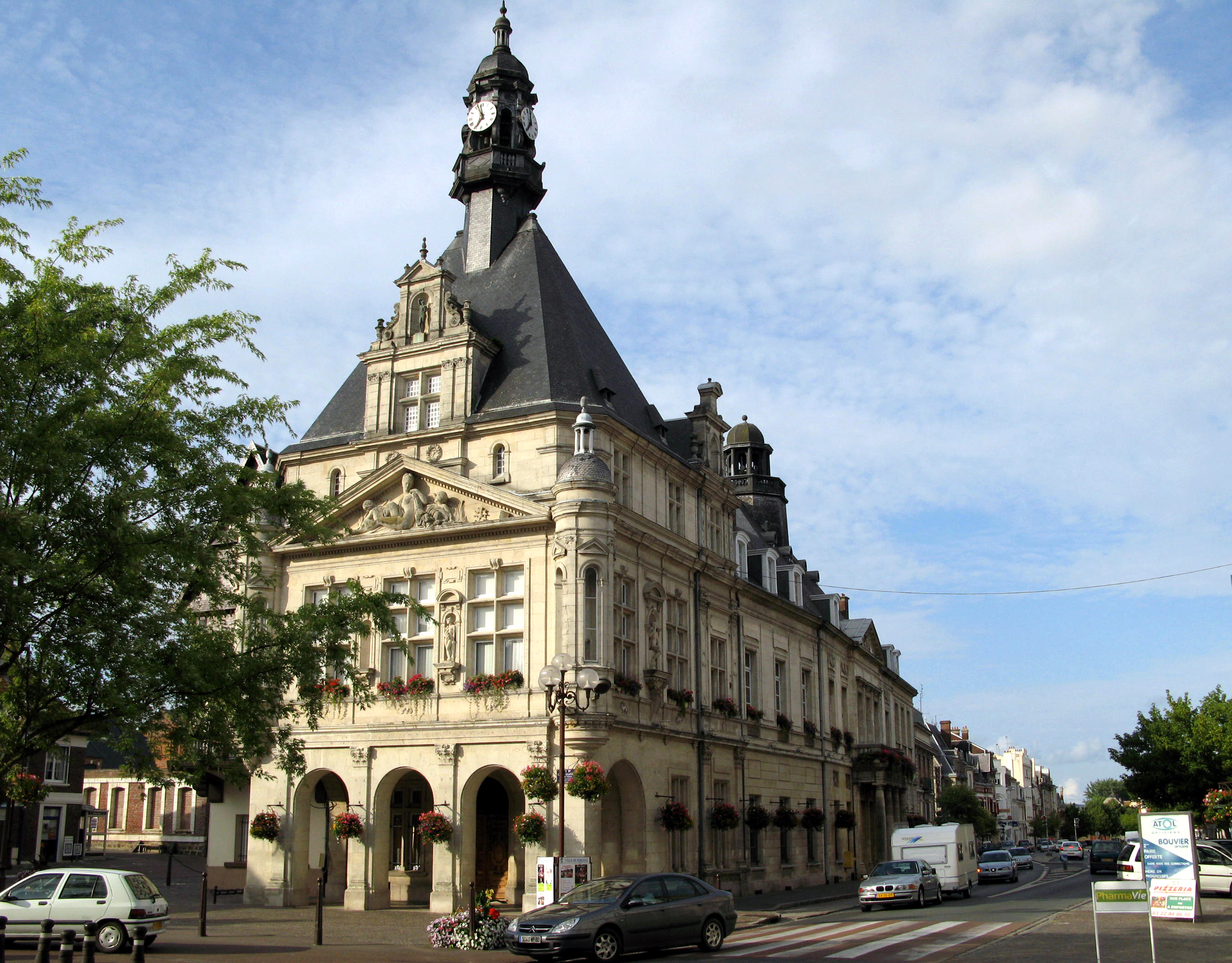 Péronne (Somme, France) - Hôtel-de-Ville.